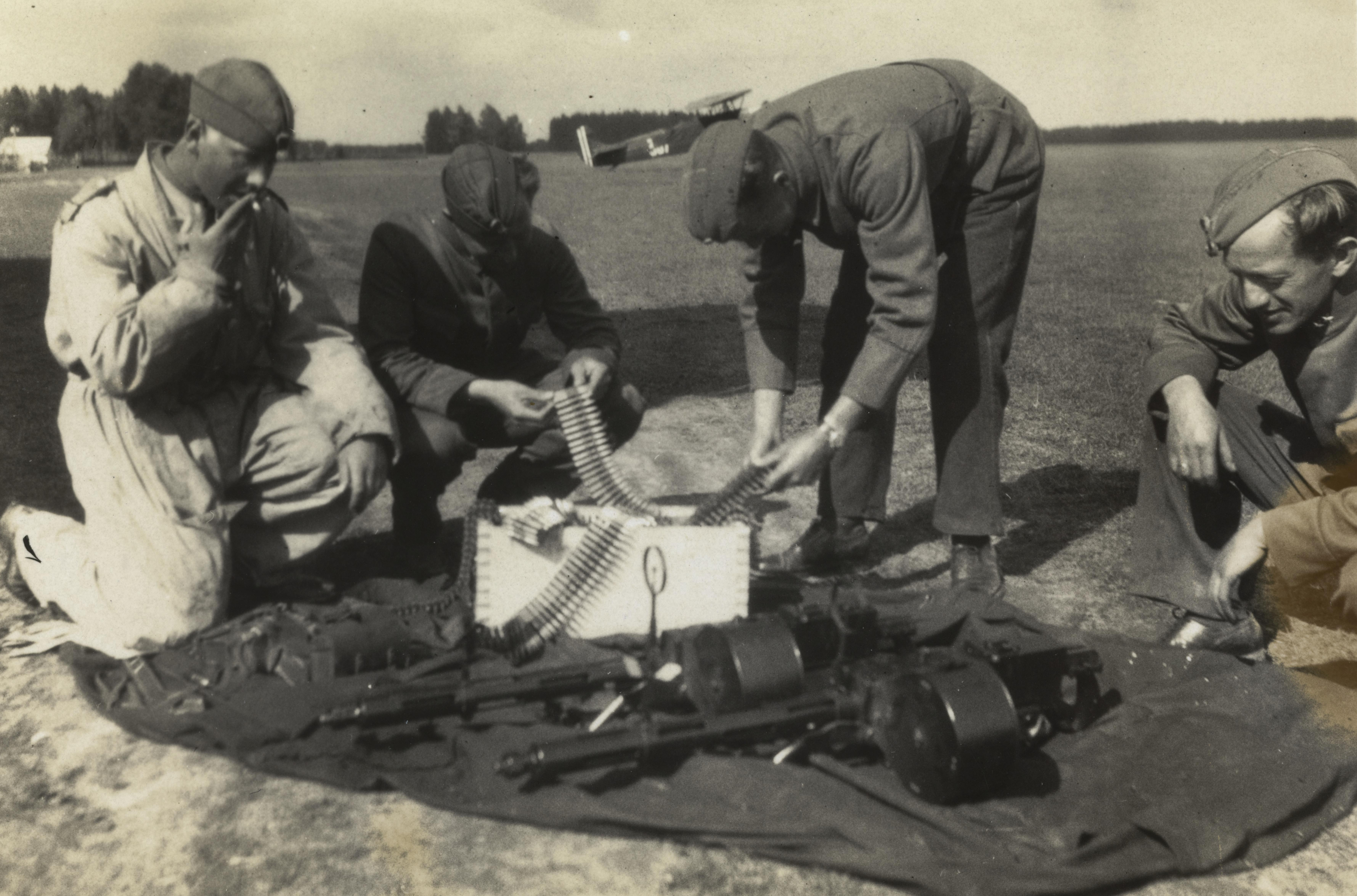 Bildet er hentet fra Nasjonalbibliotekets bildesamling. Anmerkninger til bildet var: Tittel hentet fra påskrift på komponentnr 1